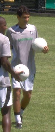 Lúcio Flávio, meia brasileiro, treinando pelo Botafogo, do Brasil.